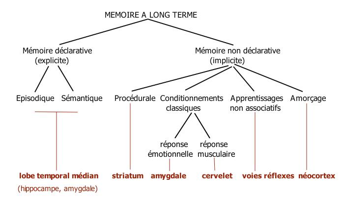 Taxonomie des systèmes de mémoire à long terme, d'après Squire, Memory systems of the brain : a brief history and current perspective, Neur of Learn. & mem, 82, 2004